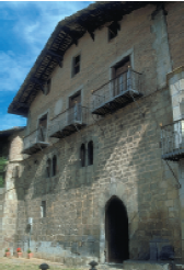 Balda dorretxea, Azkoitia